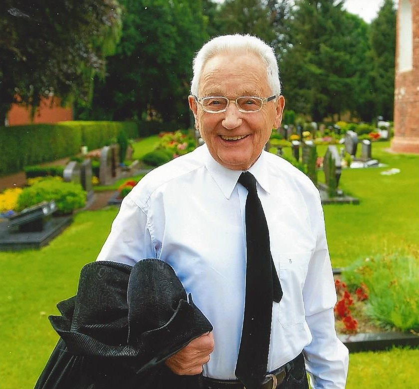 Fotografie des Theologen Werner Schröder nach einer Eisernen Hochzeit in der Barbara-Kirche (Strackholt)